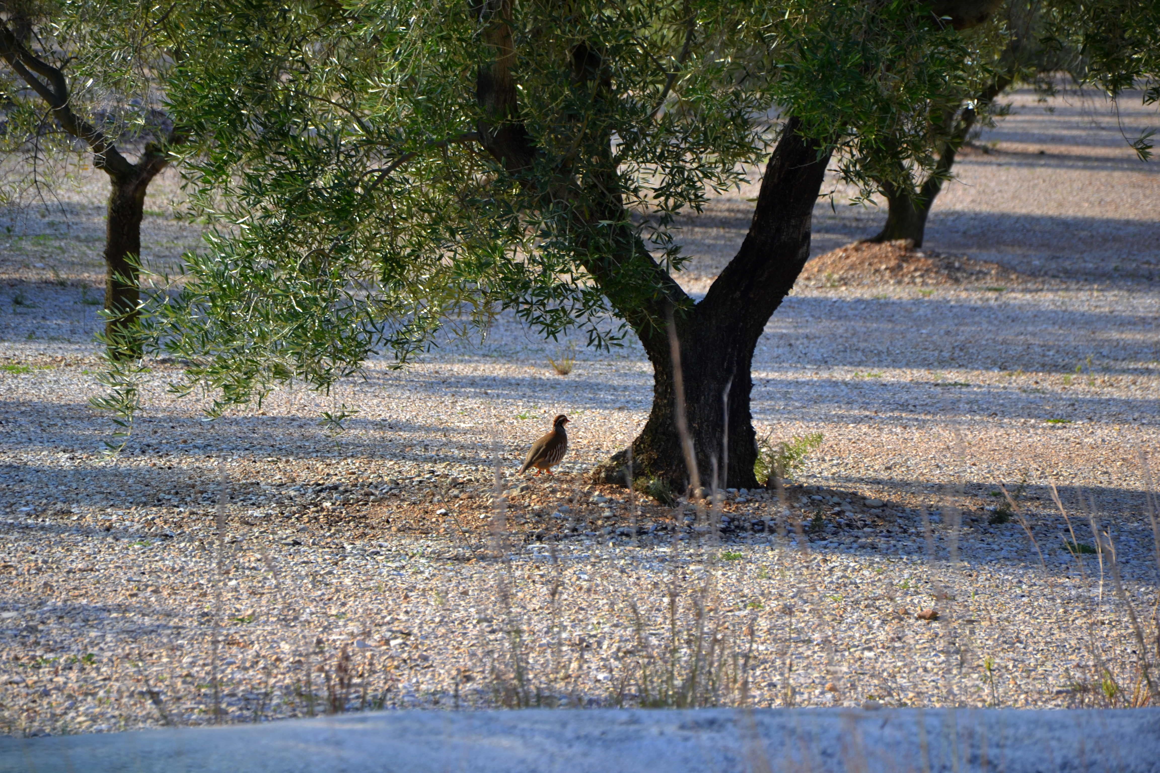 Perdiu vermella i olivera, Santa Bàrbara, Montsià